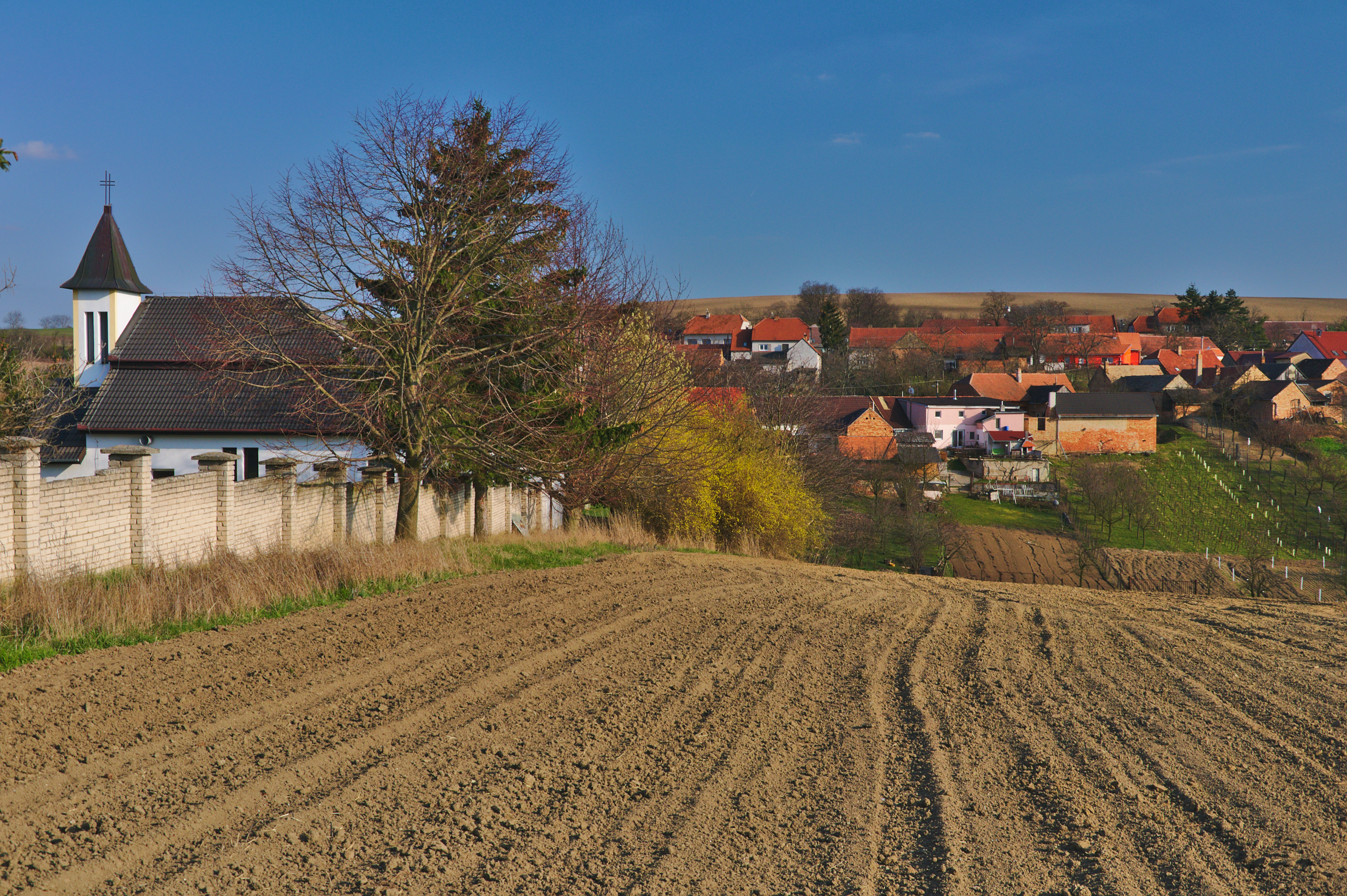 Kaple Nanebevzetí Panny Marie, Nenkovice, okres Hodonín